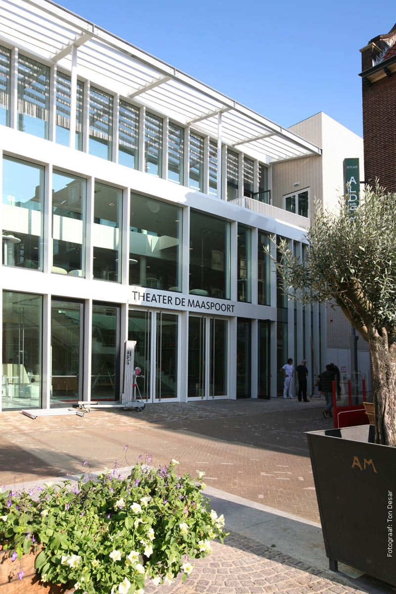 De nieuwe voorgevel van Theater de Maaspoort na de verbouwing in 2011.